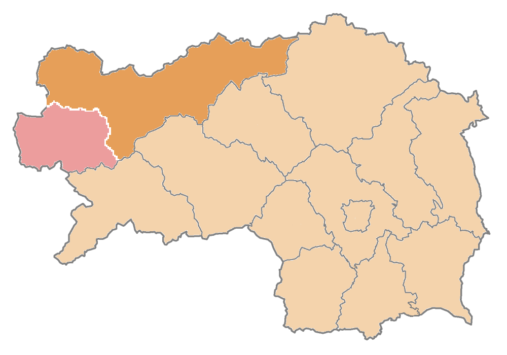 Karte: politischer Bezirk Liezen